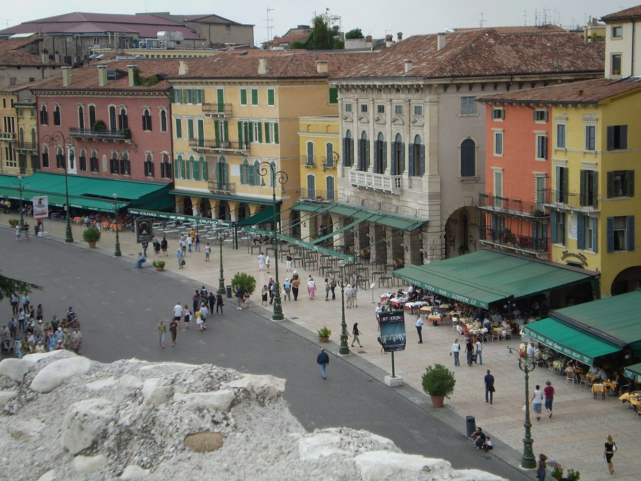 Vista desde la Arena de Verona-foto sacada en 2007